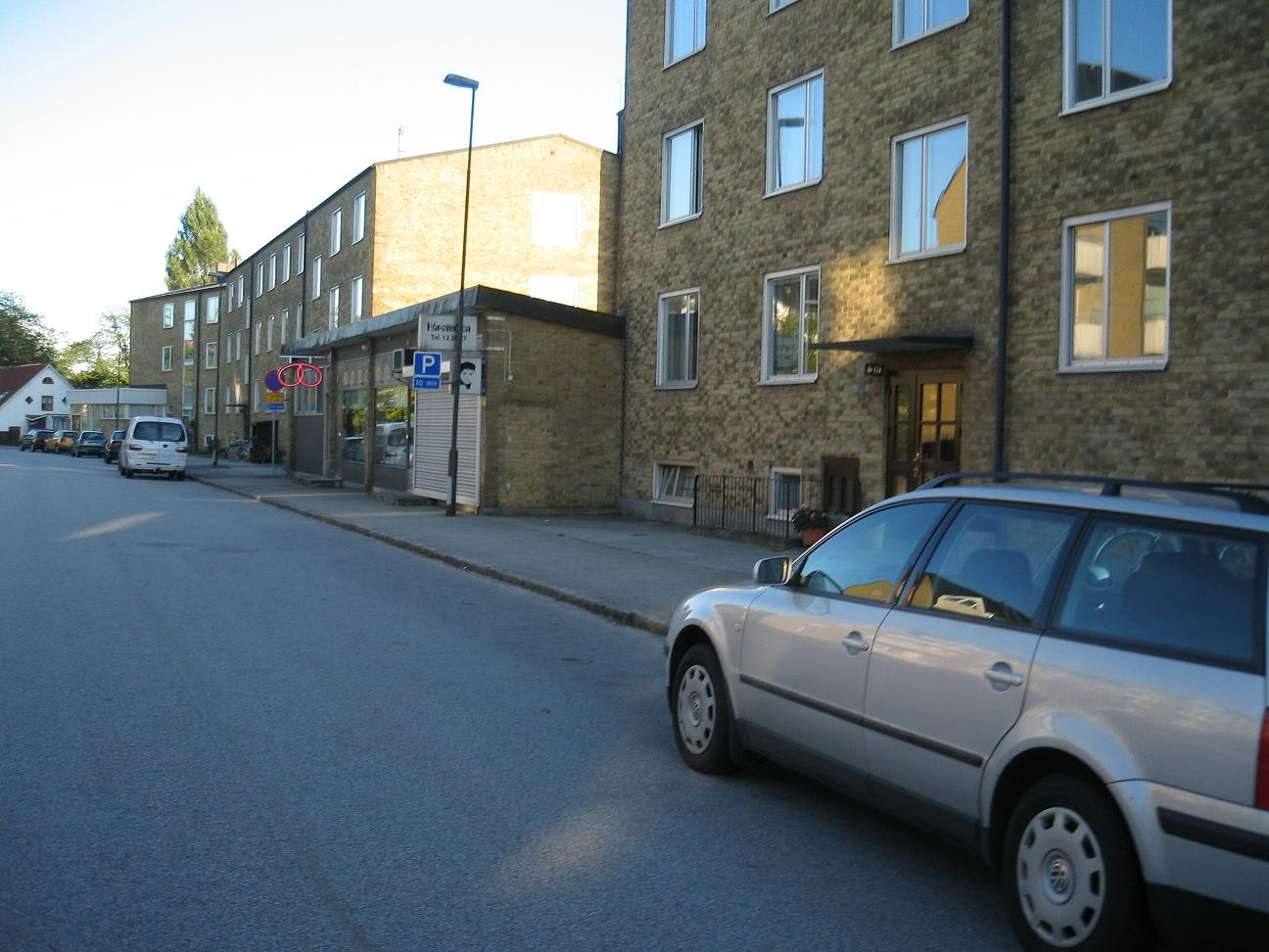 Bild tagen av mig för fri publicering